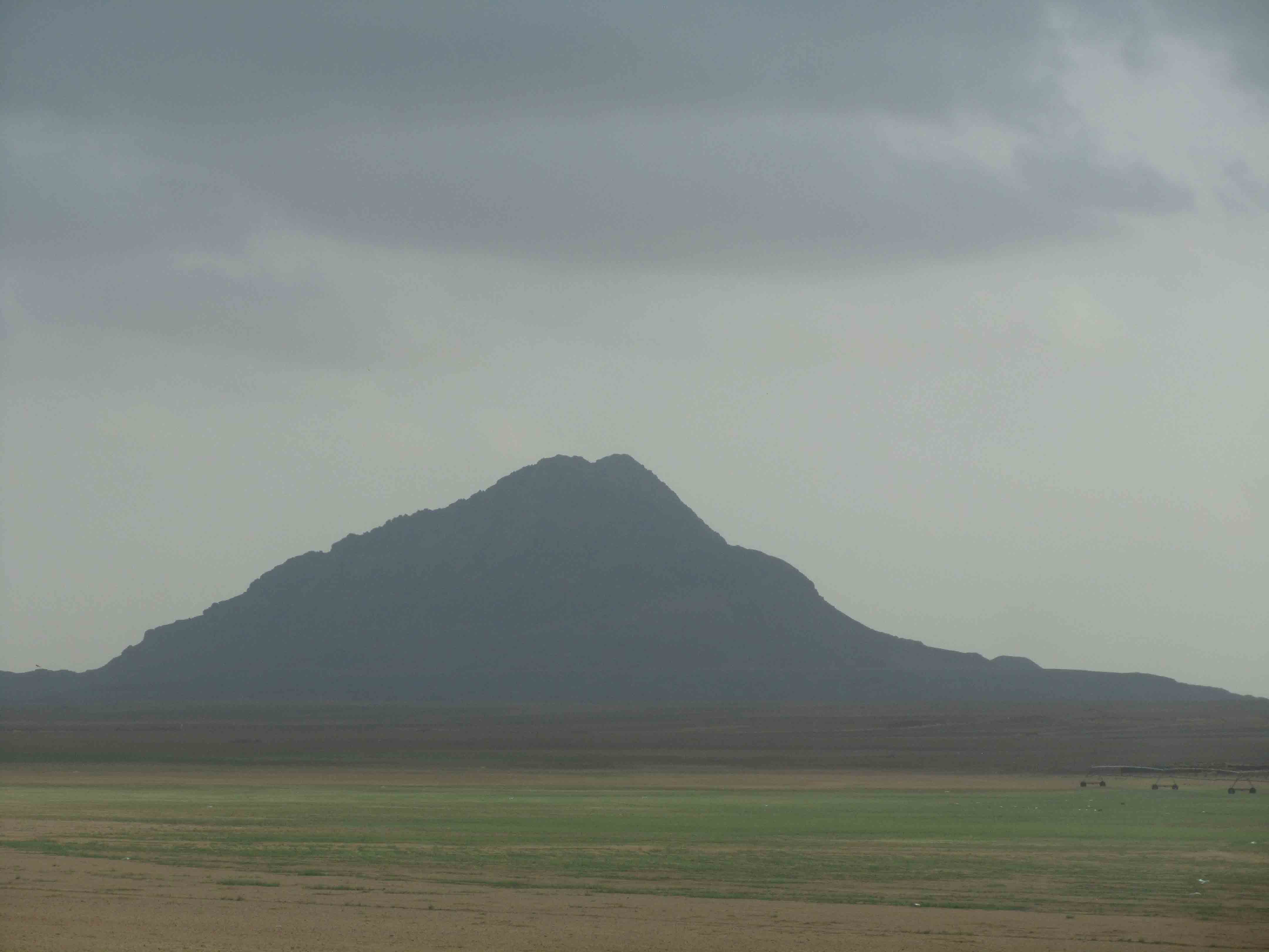 جبل جلدية من الجهه الشمالية